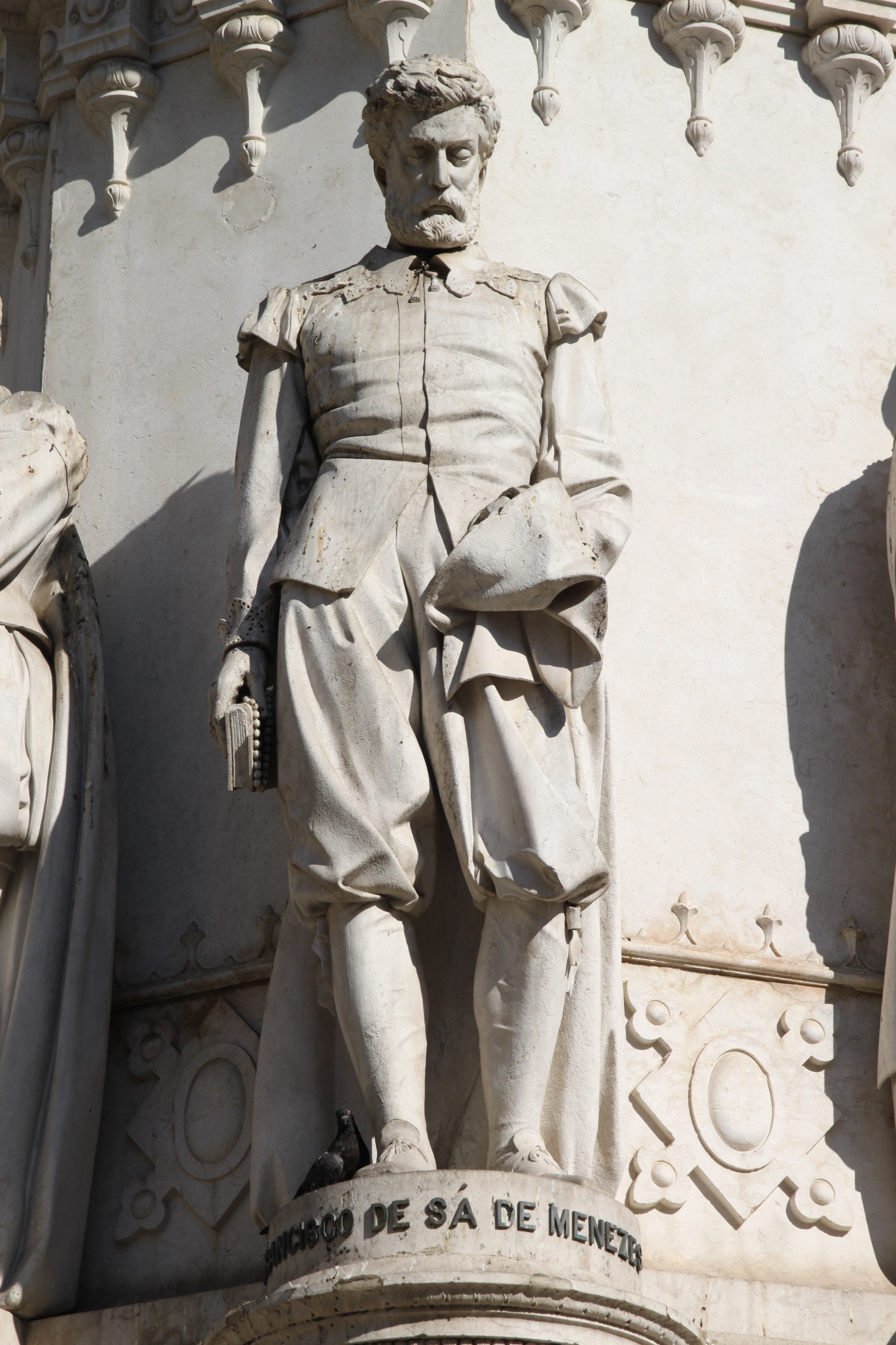 Monumento a Luís de Camões ; de Sa de Menezes This file was uploaded for Wiki Loves Monuments in Portugal with the unique identifier 97028265.